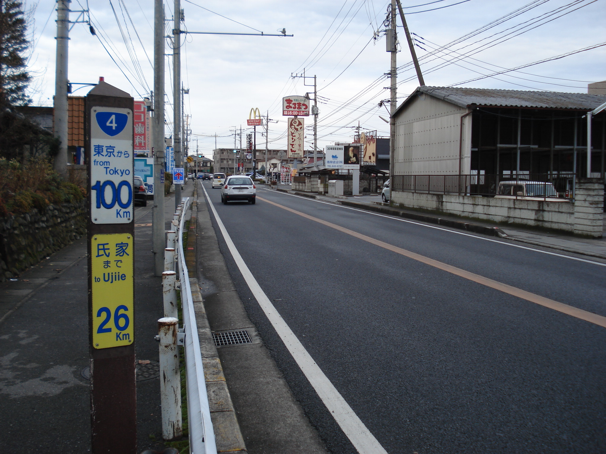 国道4号 起点より100kmポスト 栃木県宇都宮市雀の宮1丁目